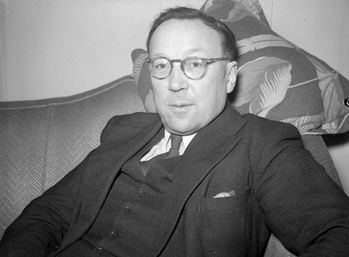 Engineer Robert Watson-Watt